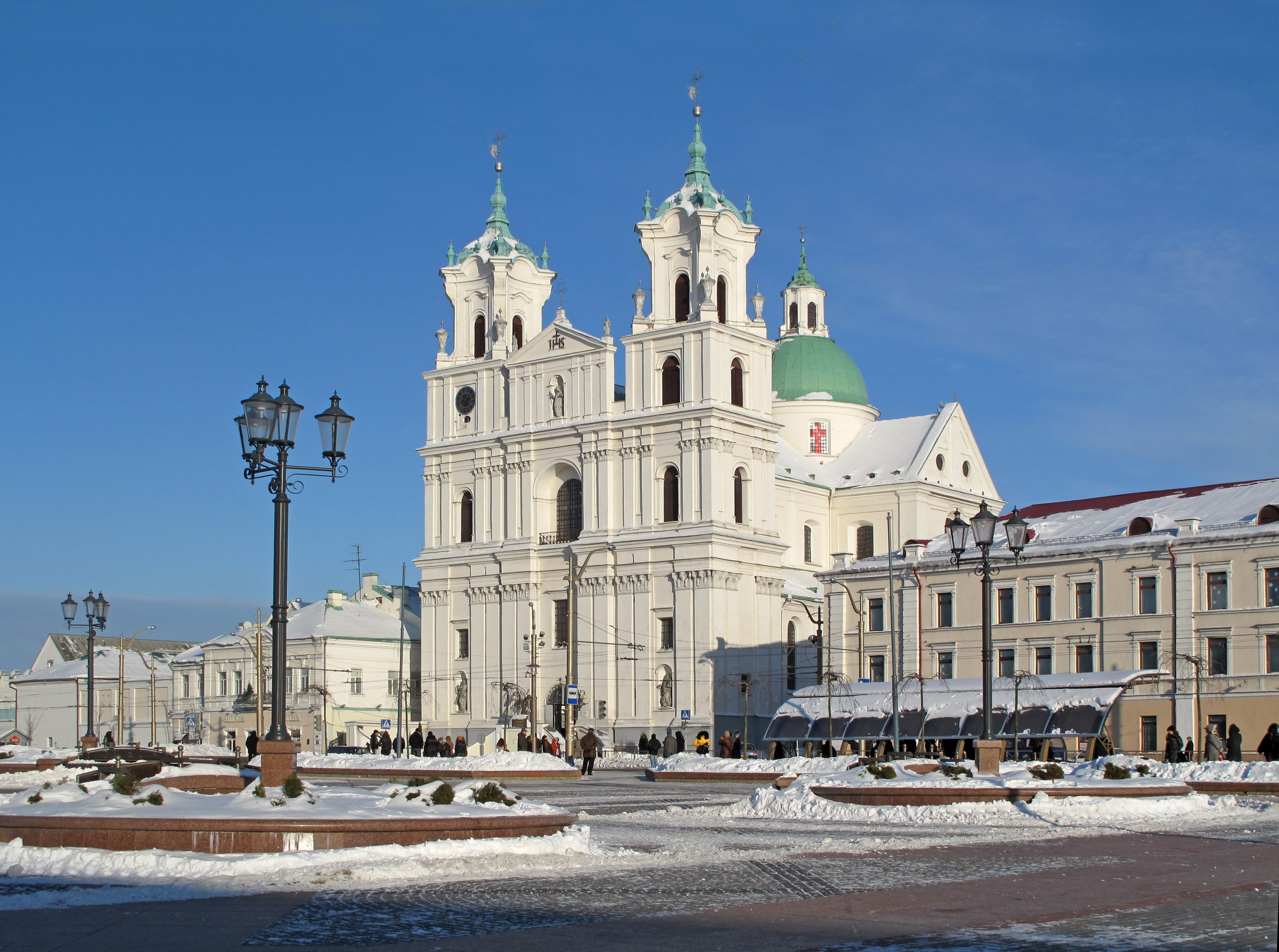 Беларуская (тарашкевіца): Фарный